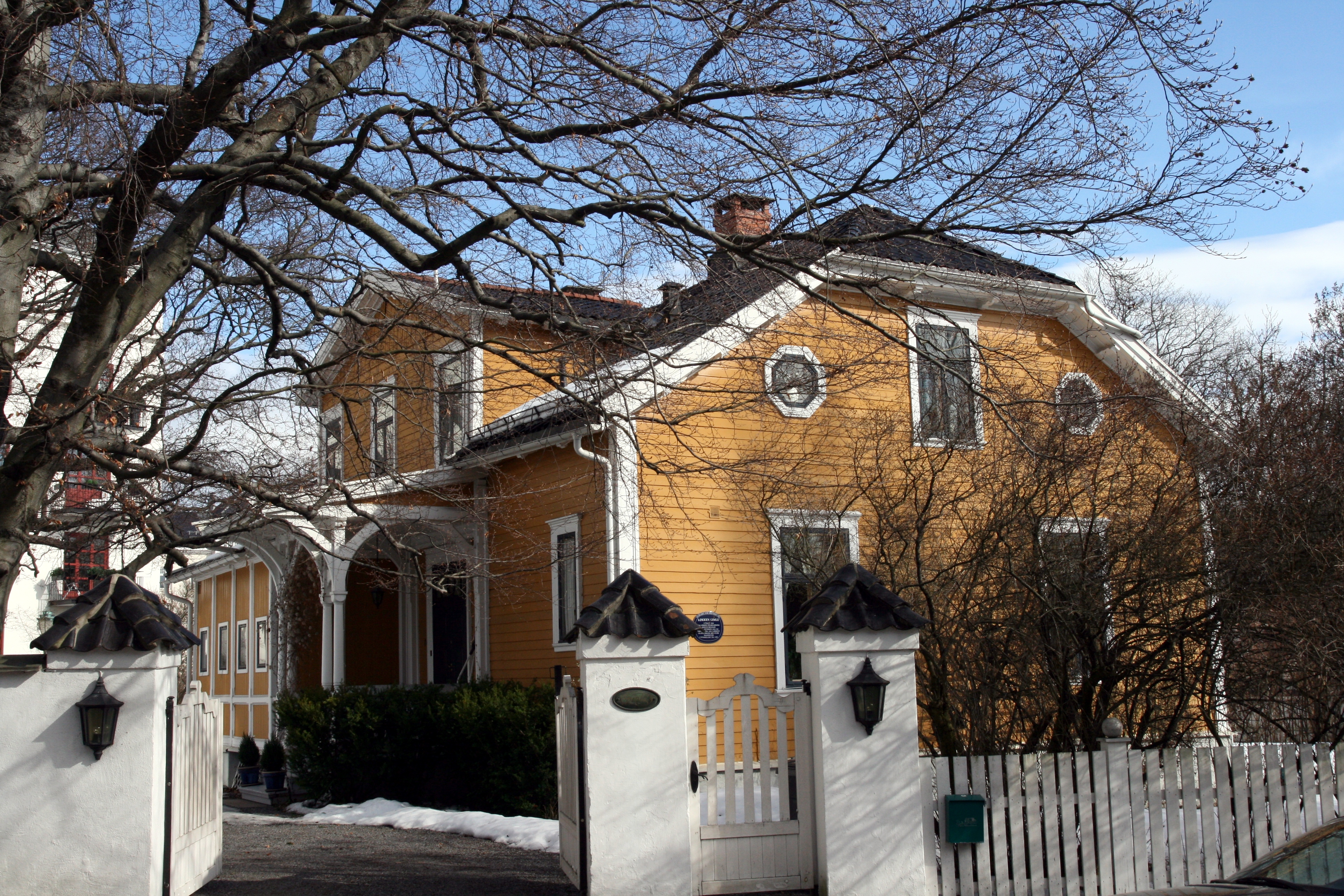 Løkken Gimle i strøket med samme navn i Bydel Frogner.